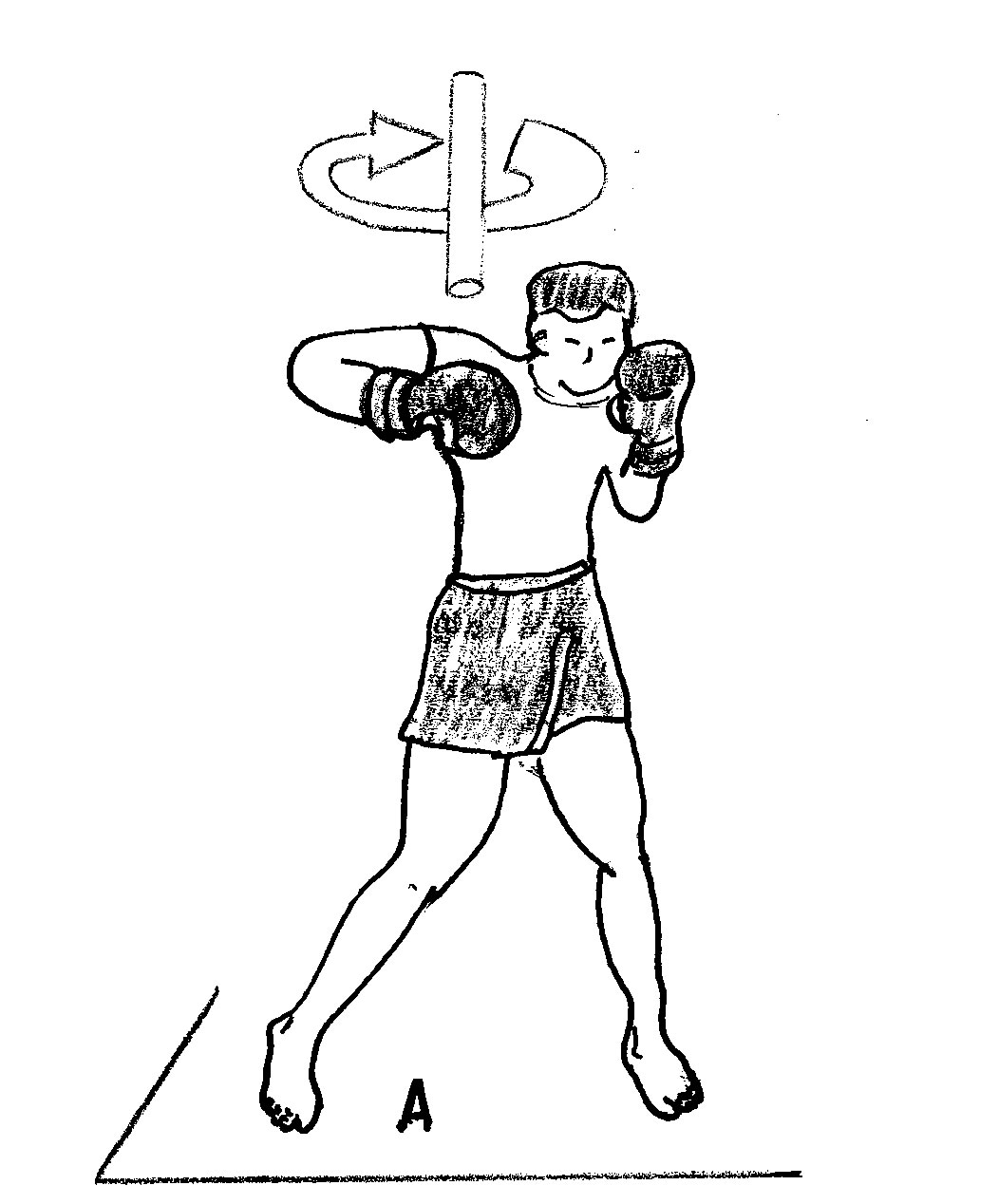 crochet5.jpg